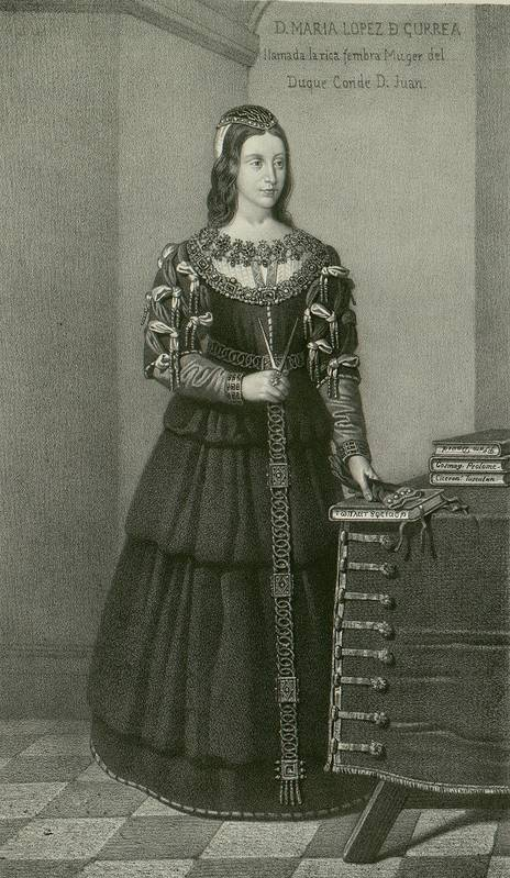 Doña María de Gurrea duquesa de Villahermosa.